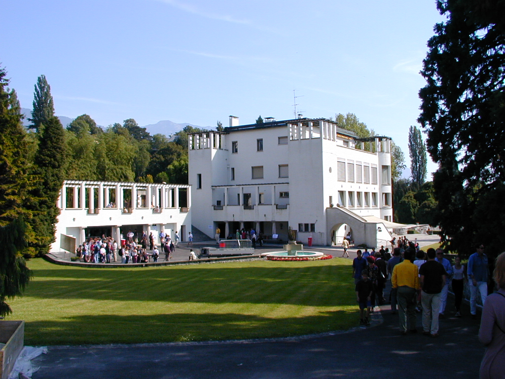 Villa Karma,Clarens Adolf Loos architecte